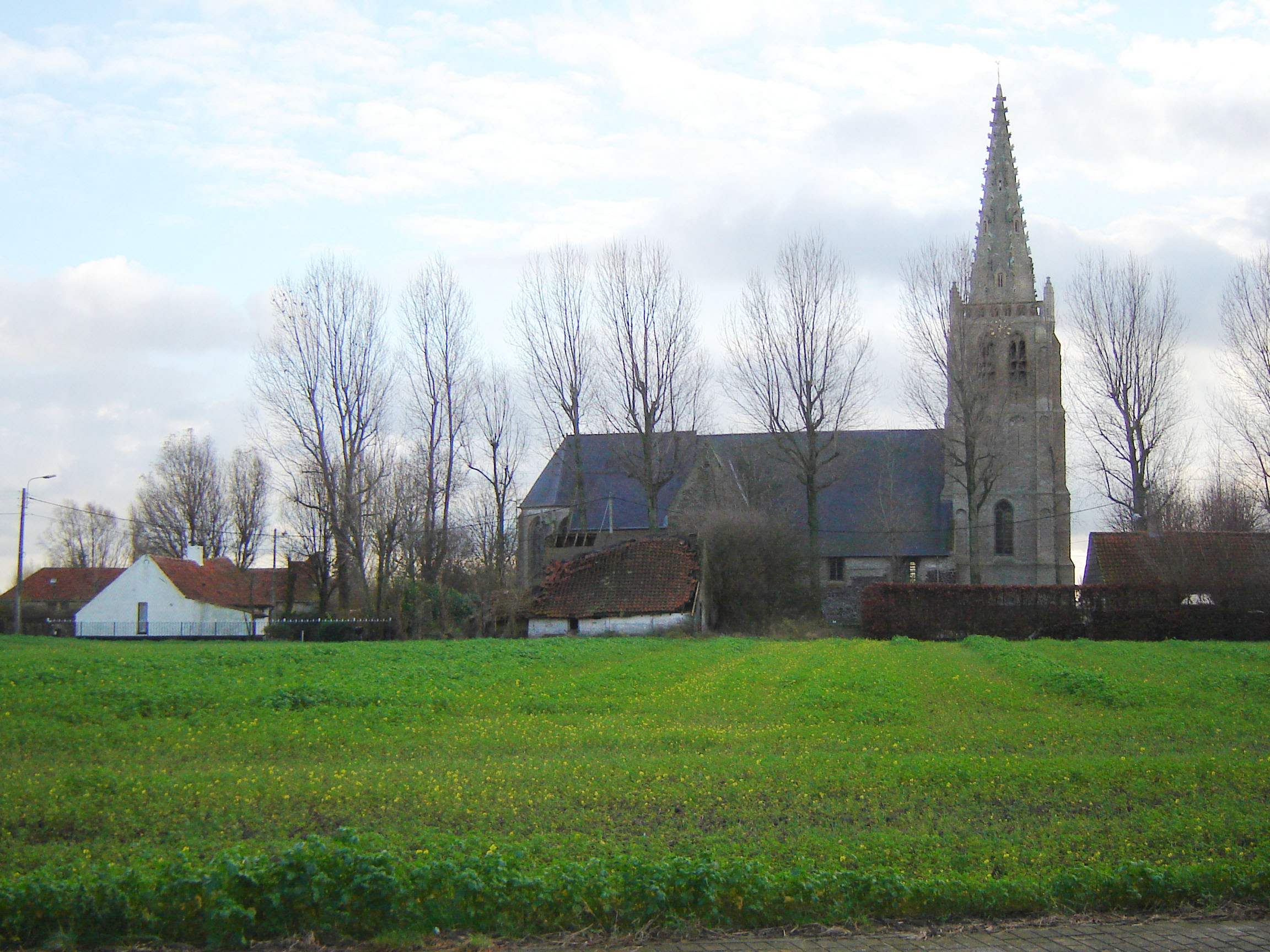 Sint Audomaruskerk in Vinkem (Beauvoorde), Veurne. Saint Audomar Church in Vinkem (Beauvoorde), Veurne, West-Flanders, Belgium